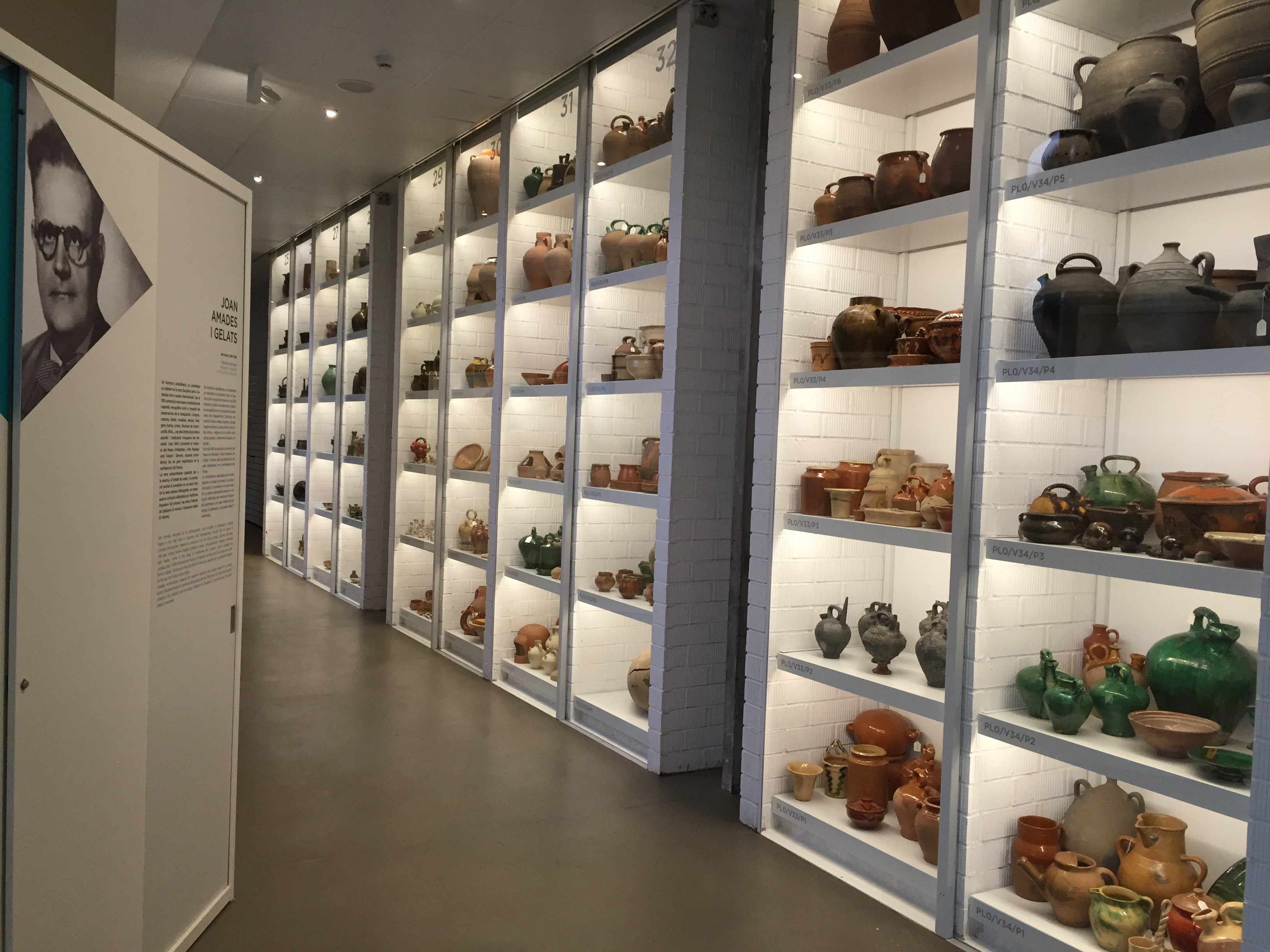 Magatzem obert del Museu etnològic de Barcelona